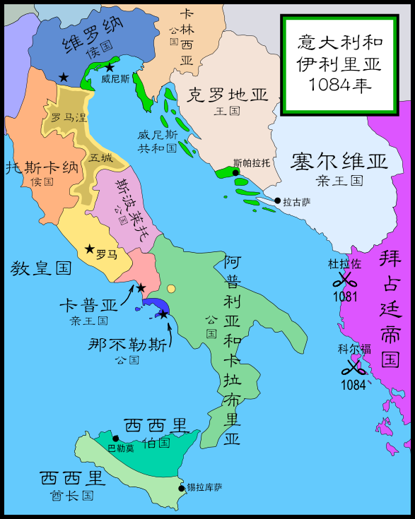 中文（中国大陆）: 1084年的意大利和伊利里亚